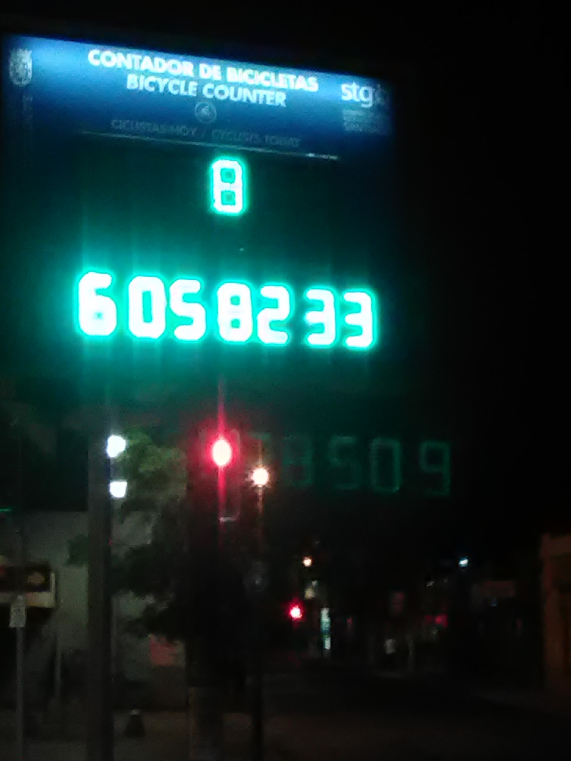 Aparato electrico que mide paso de bicicletas